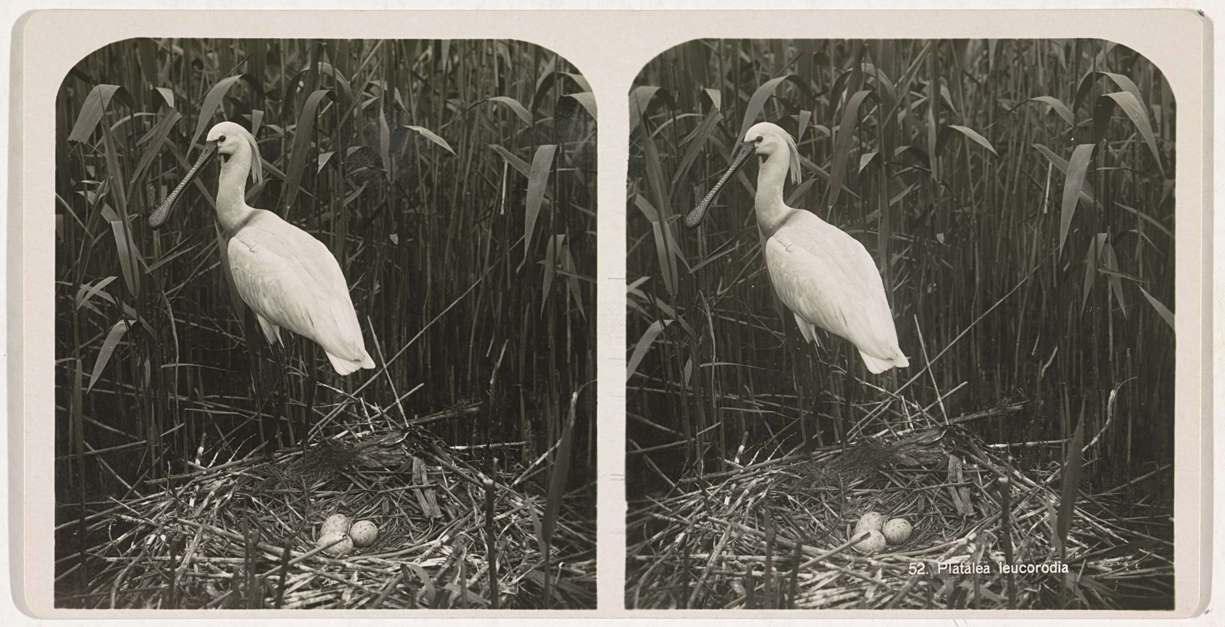 De foto is afkomstig uit een serie van 12 stereofoto's met moerasvogels die bewaard worden in het originele mapje. Bij dit mapje zit ook een blaadje met gedrukte tekst dat informatie bevat over de vogels.; photograph; stereofoto